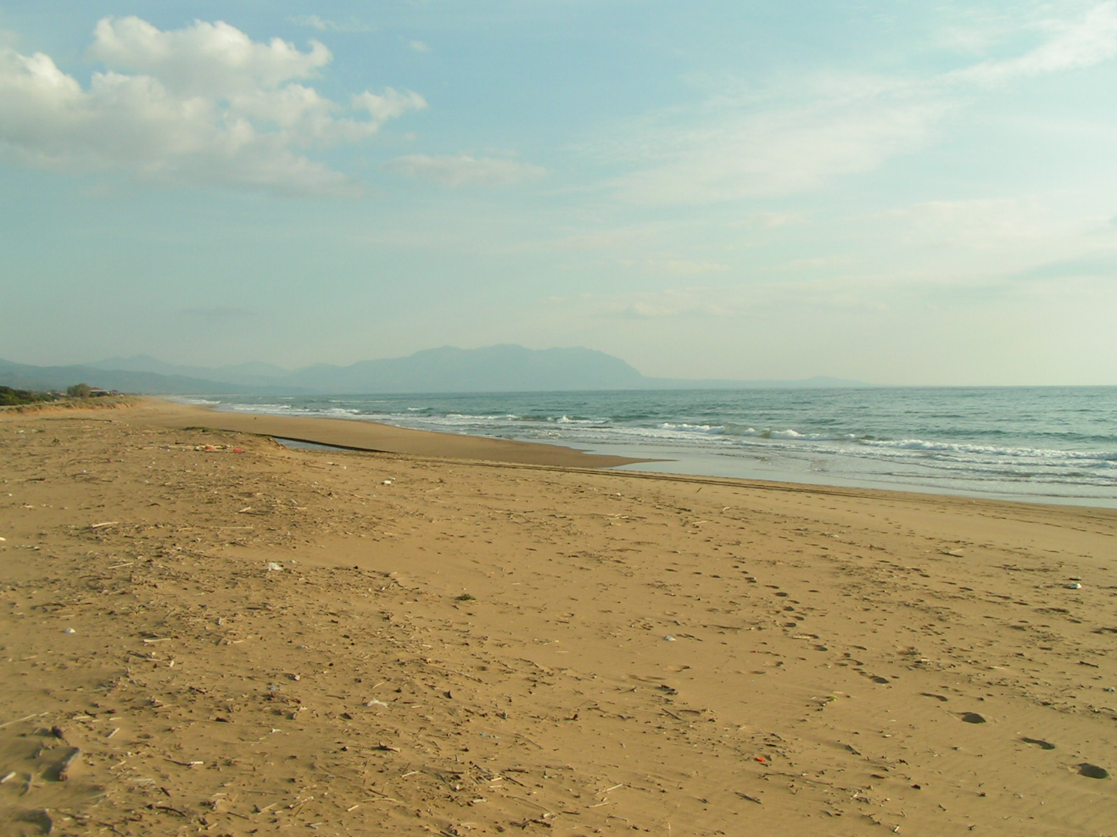 Zacharo beach